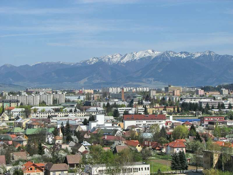 Žilina skyline